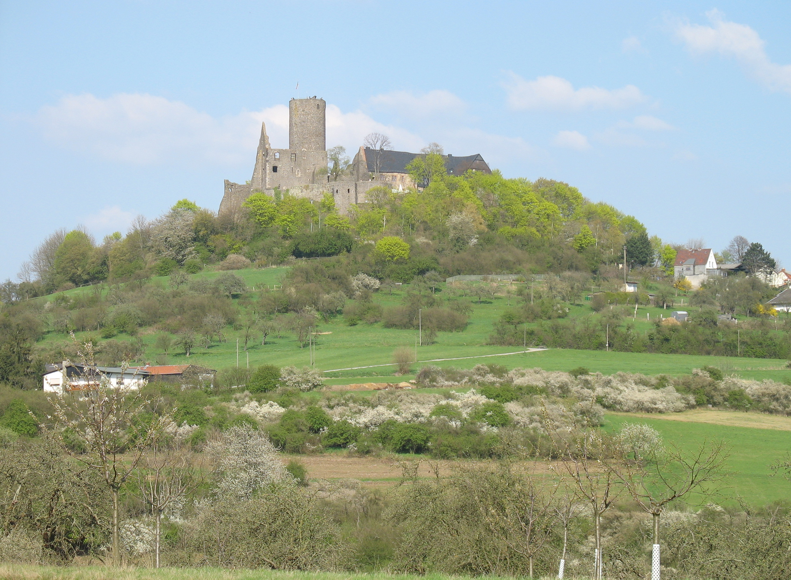 Burg Gleiberg bei Gießen.